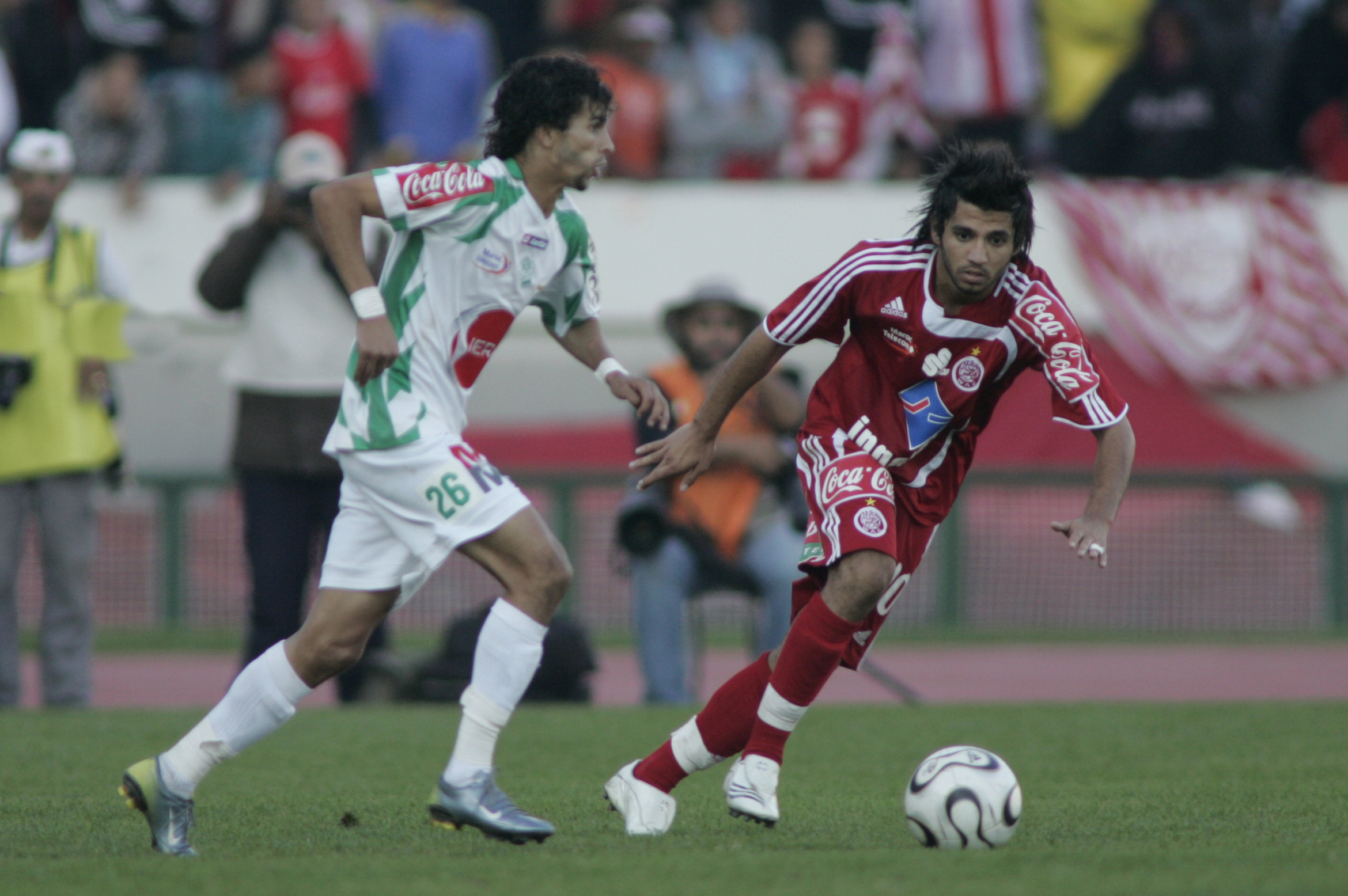 Wydad Casablanca vs Raja de Casablanca, November 16 2008